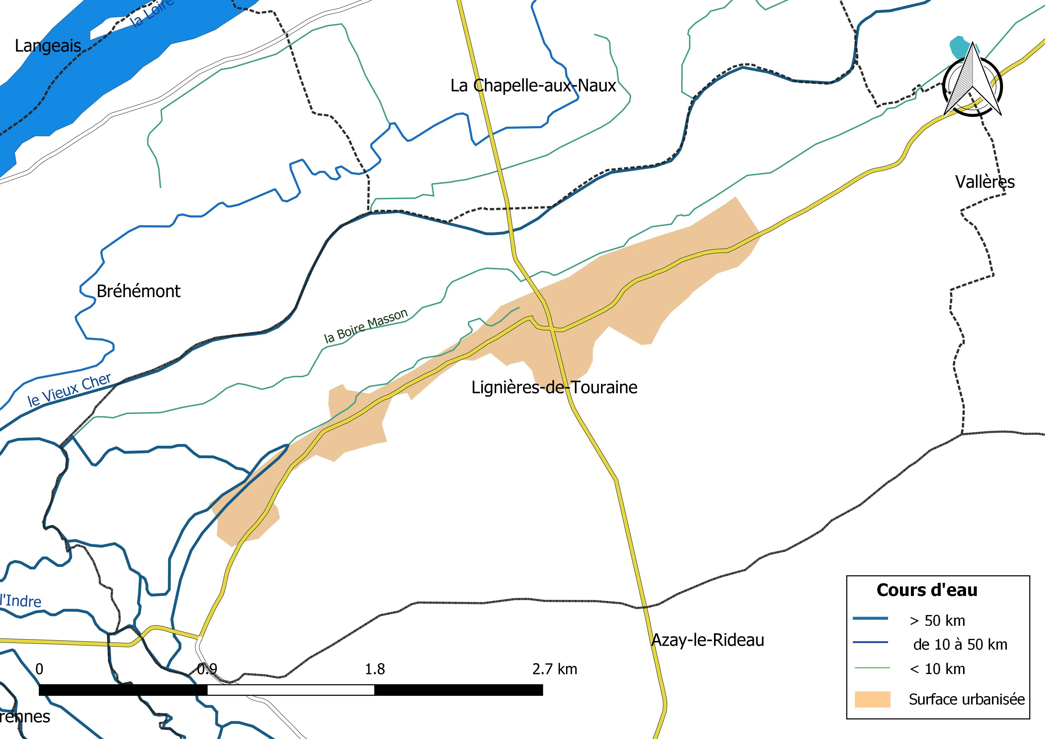 Carte du réseau hydrographique de la commune de Lignières-de-Touraine (France).